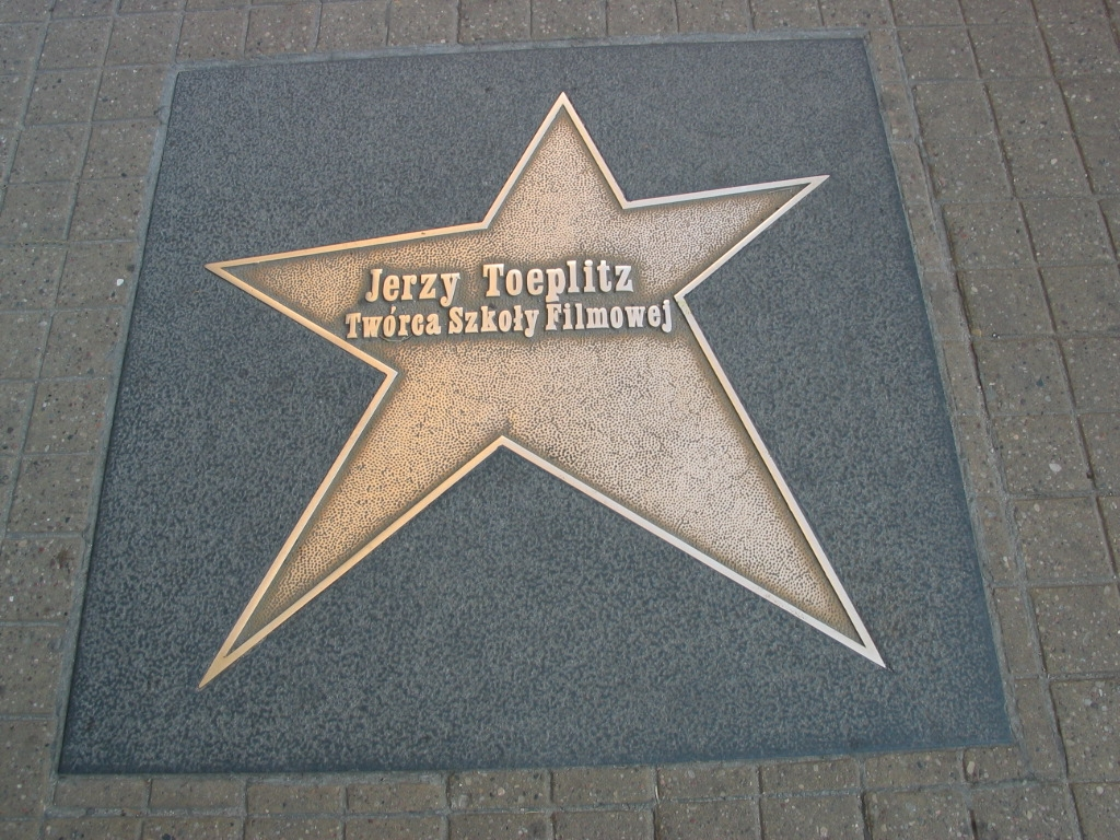 Łódź Walk of Fame - Jerzy Toeplitz